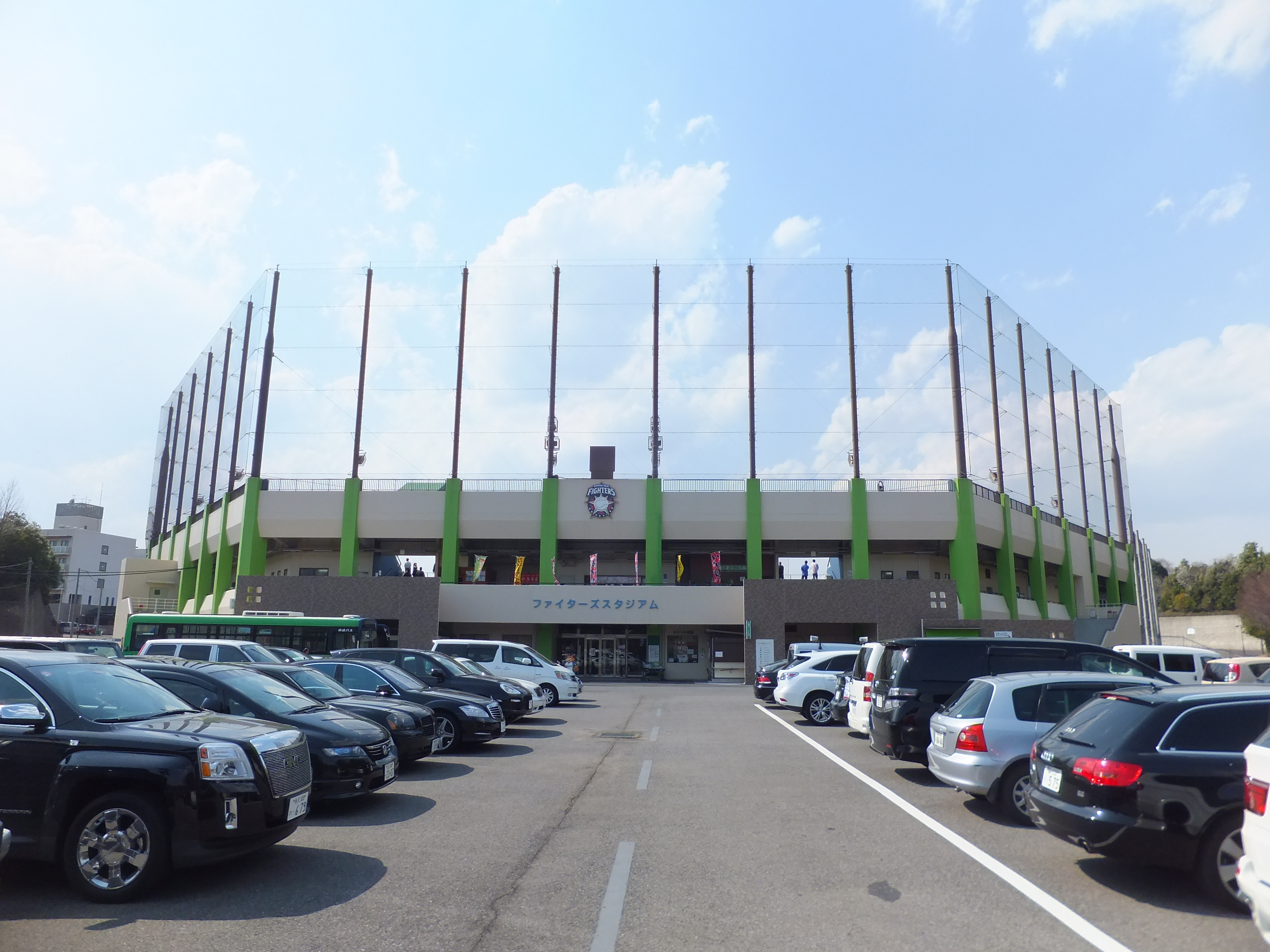 ファイターズスタジアム